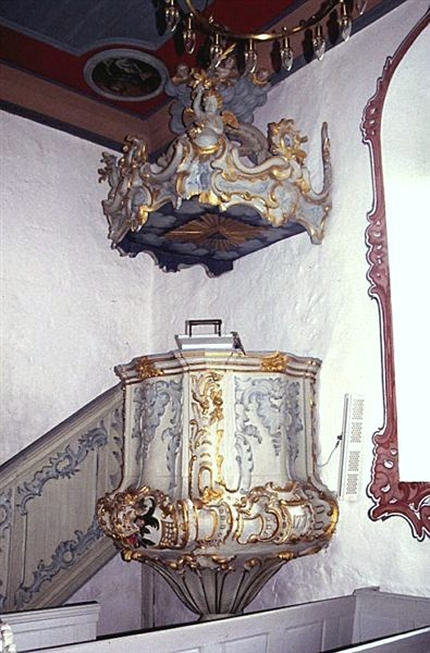 Sjørslev Kirke, prædikestol